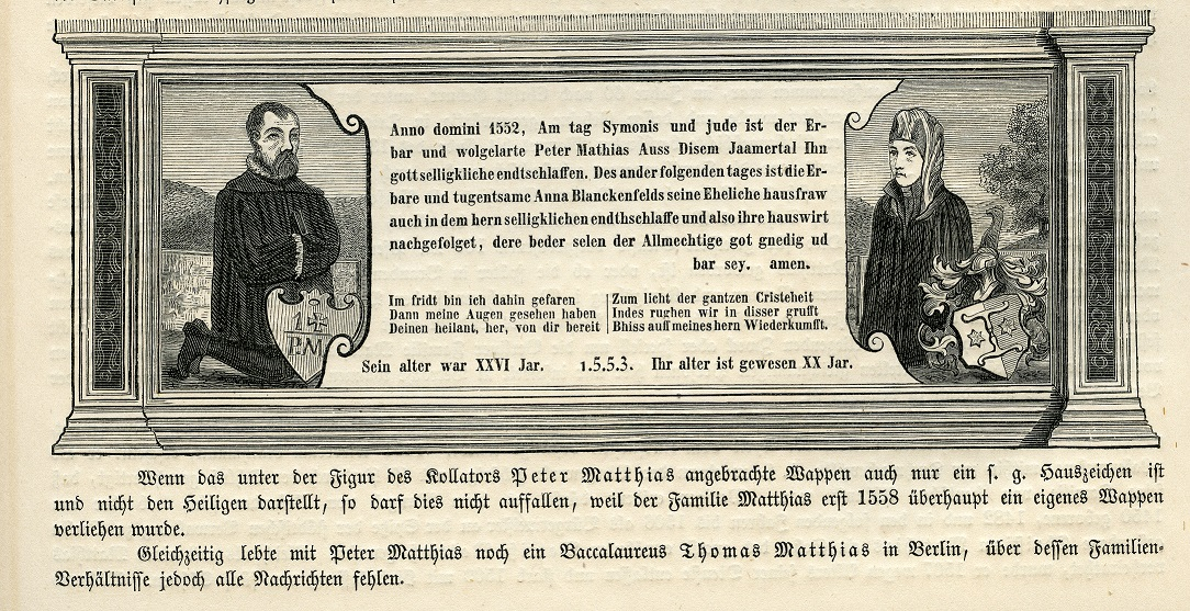 1553, Anna Magdalena, fille du bourgmestre de Berlin Johann épouse Peter Matthias, fils de Georg Matthias, bourgmestre de Berlin